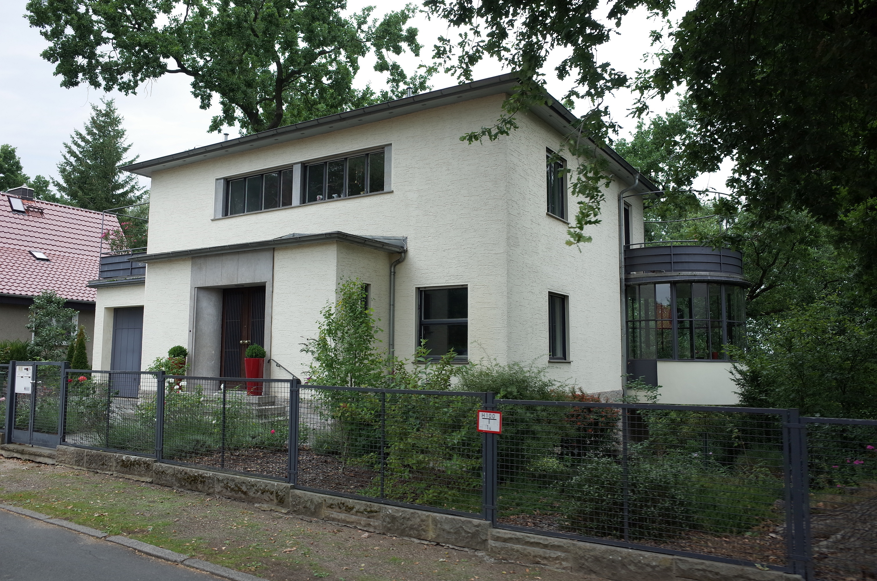 Dessau-Roßlau, Ortsteil Haideburg, Villa Melchert (Baudenkmal im Denkmalverzeichniss Sachsen-Anhalt, Erfassungsnummer: 094 40120 000 000 000 000 [1])